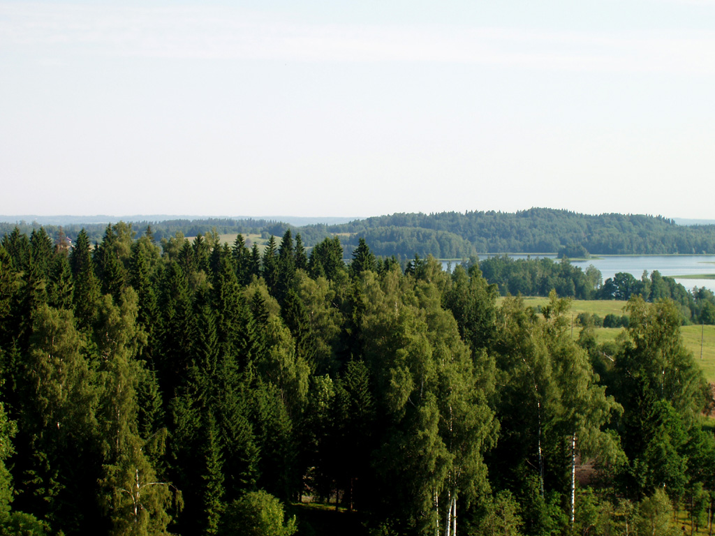 Skats no Gaiziņkalna uz Puļpu kalnu un Viešūru